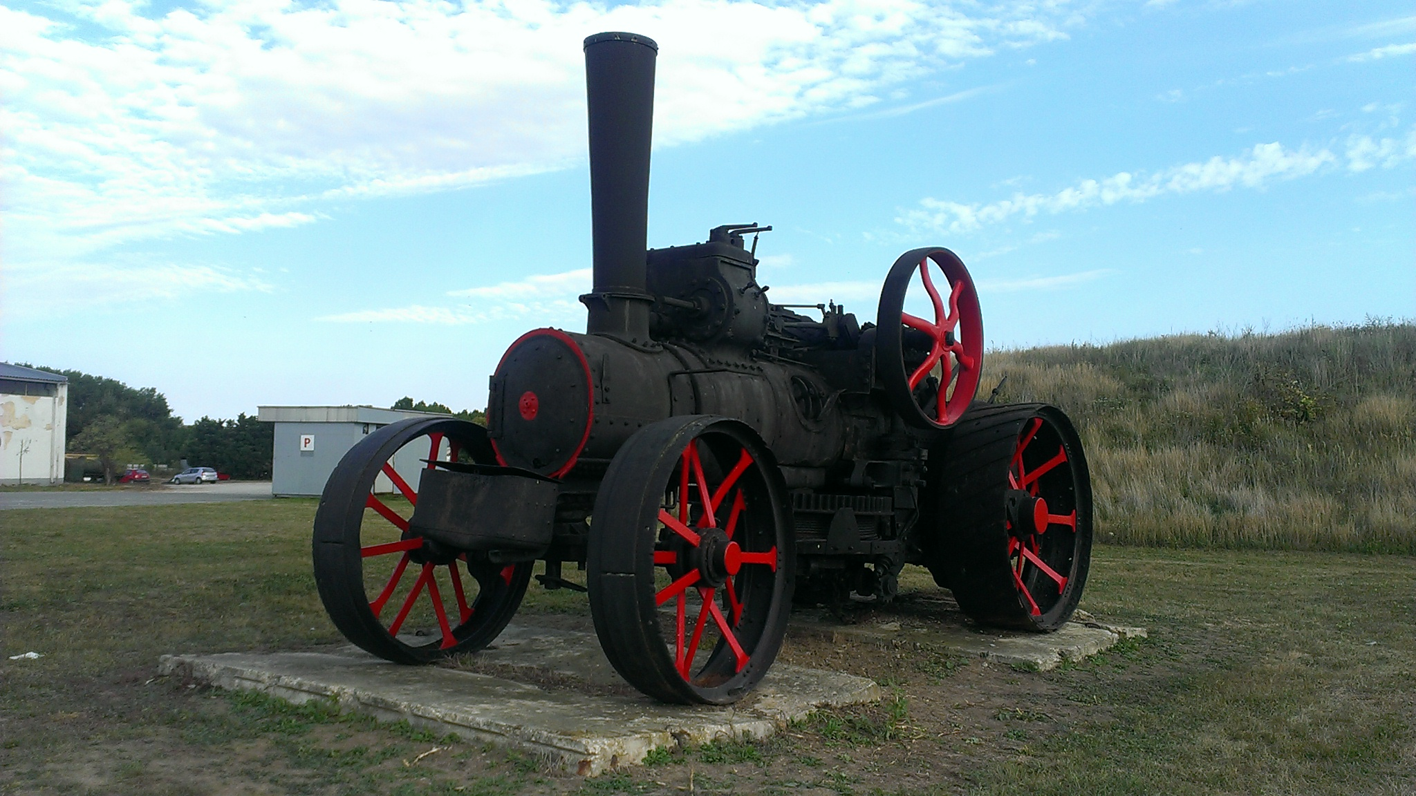 Parná oračka